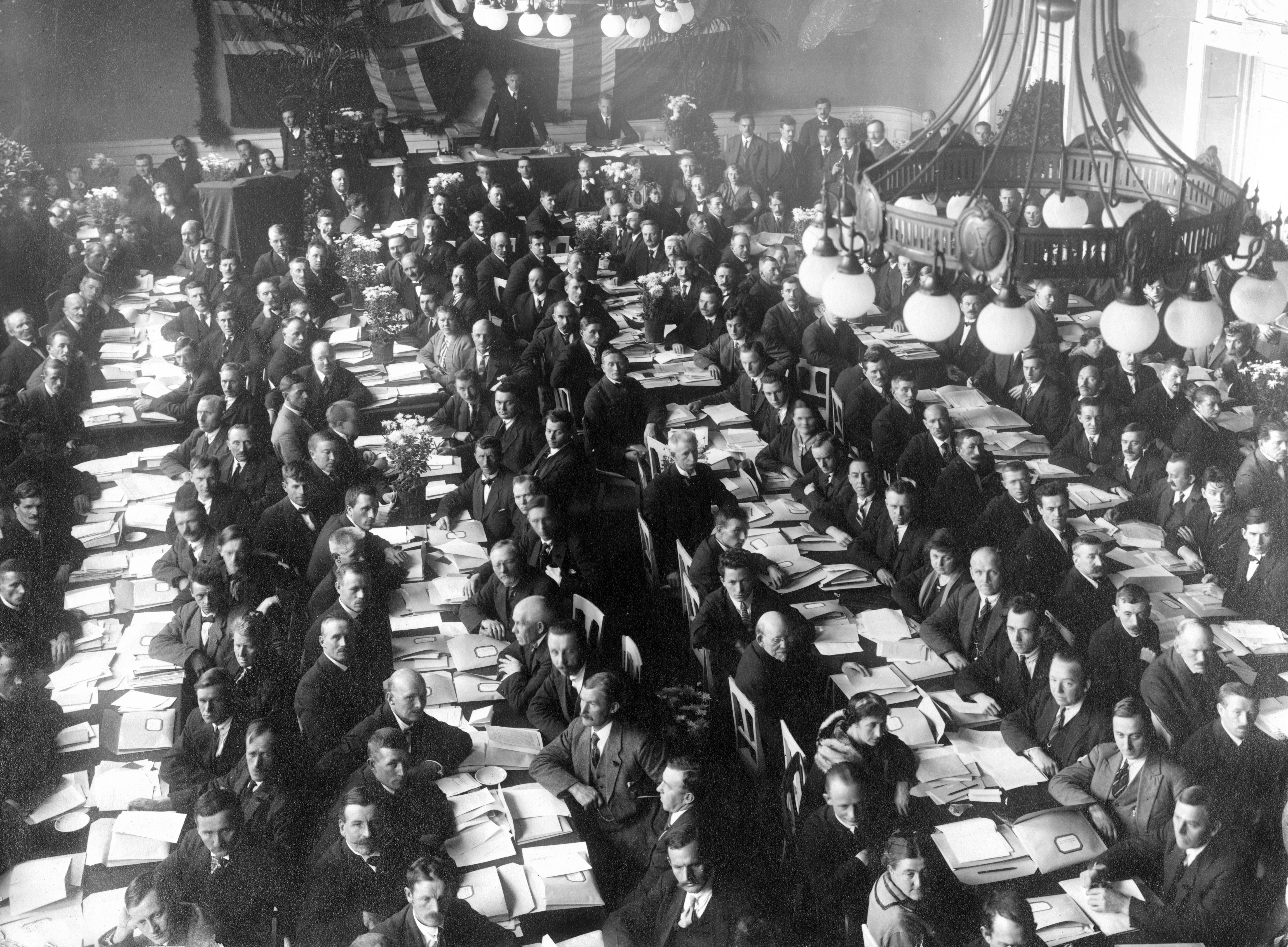 Fra Det norske Arbeiderpartis landsmøte, 3.–6. november 1923.